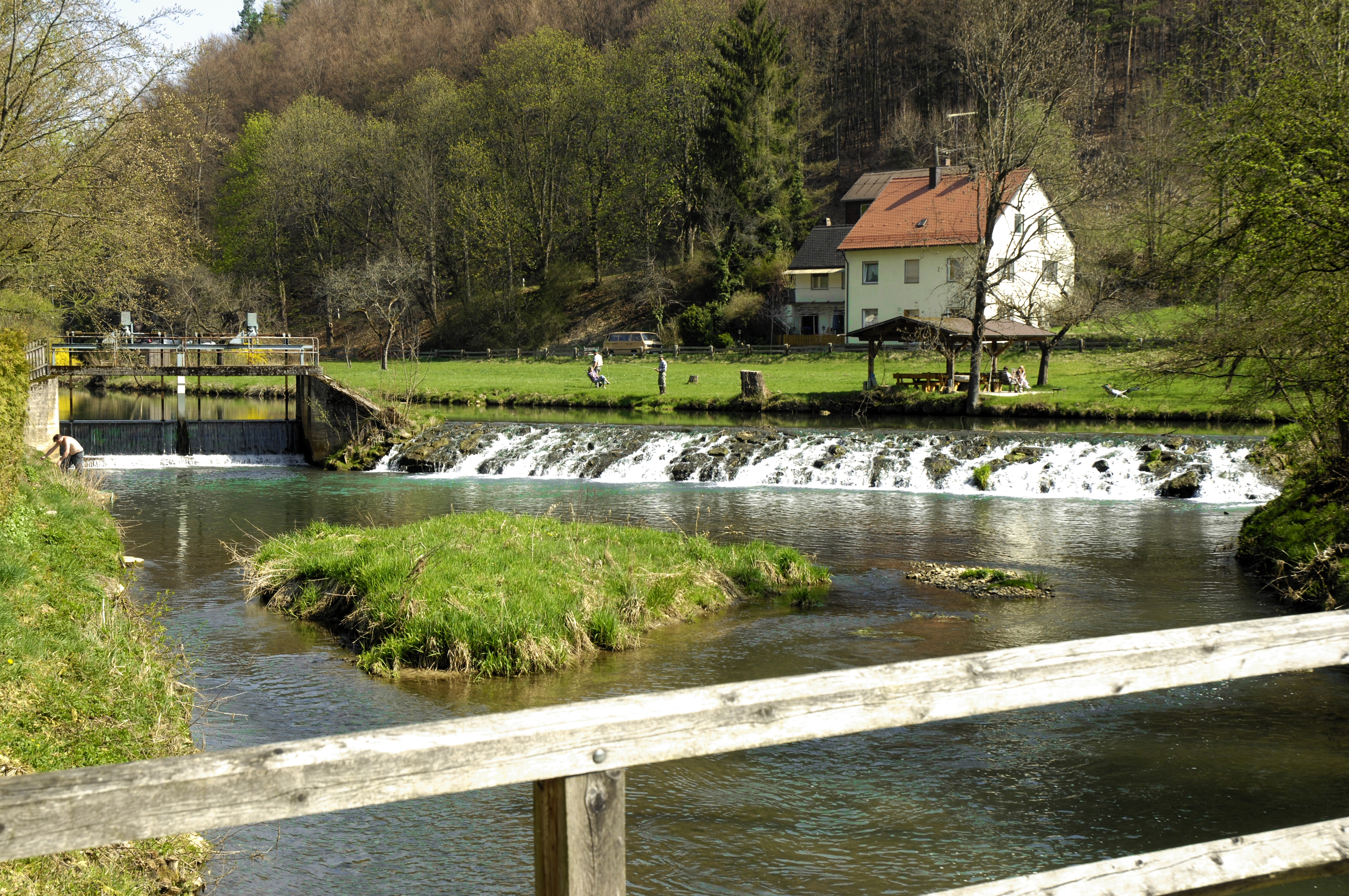 Die Wiesent, Wehr und Angler